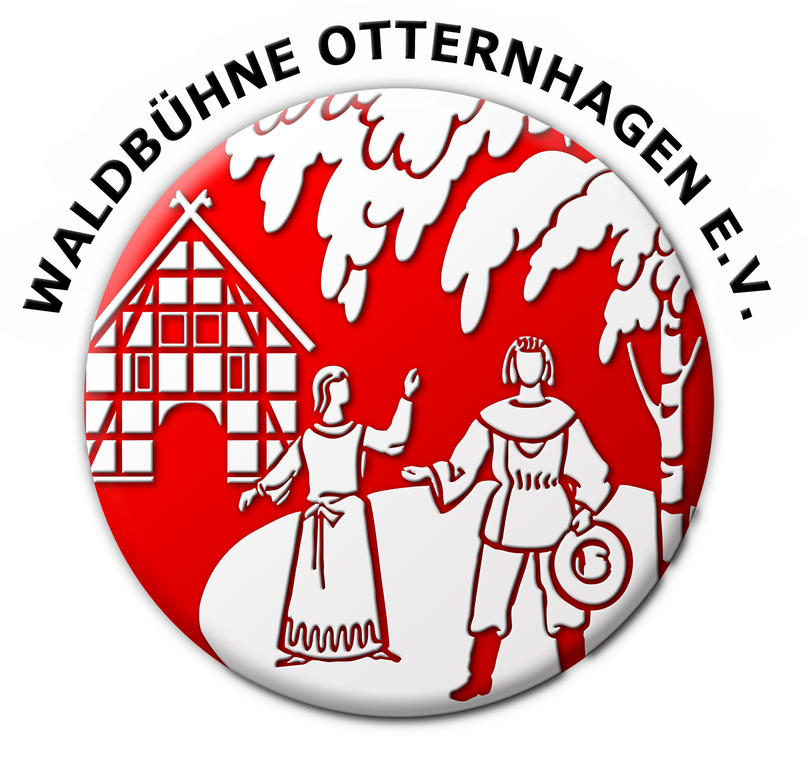 Logo der Waldbühne Otternhagen e.V.